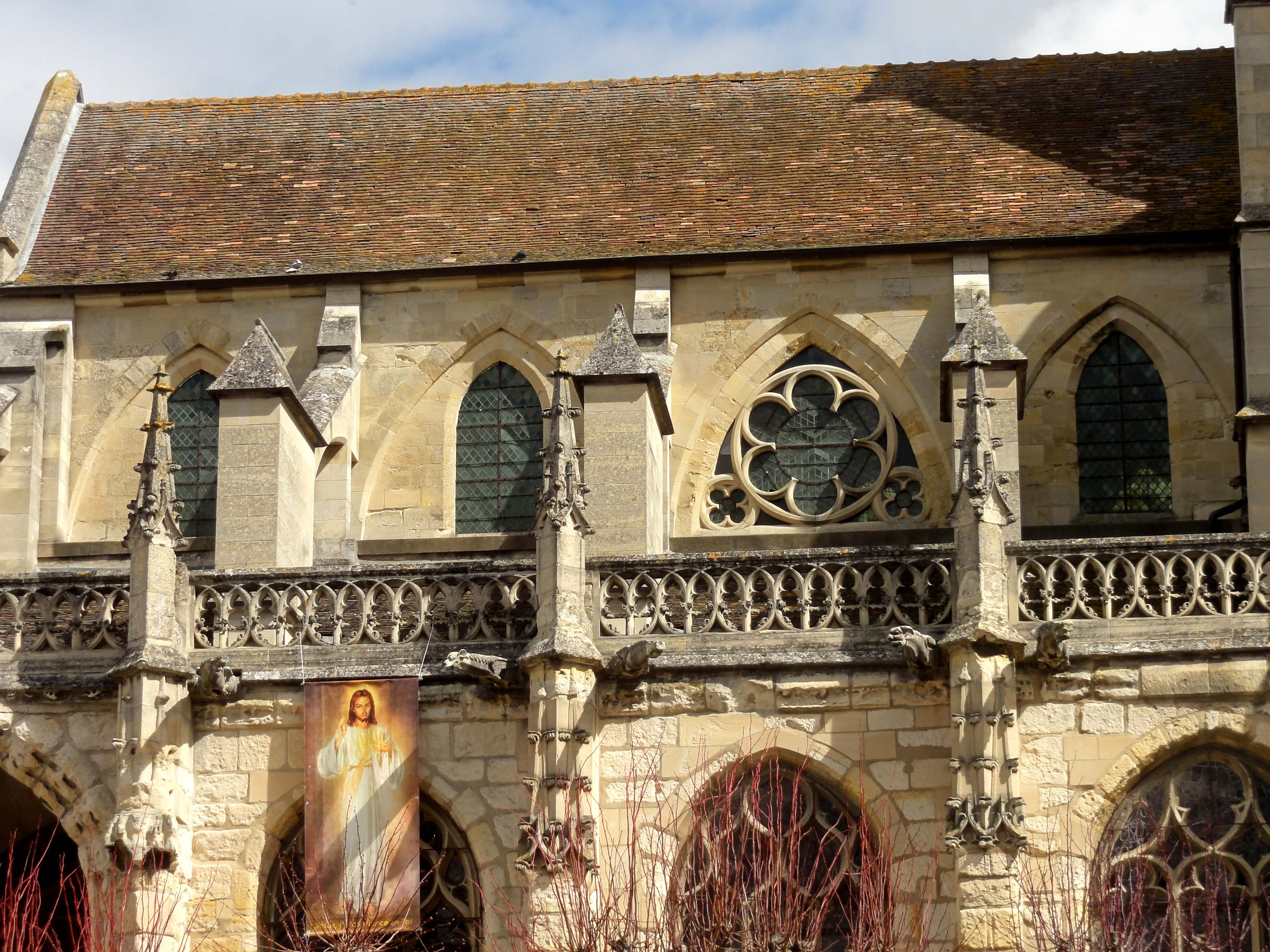 Église Saint-Martin - voir titre.